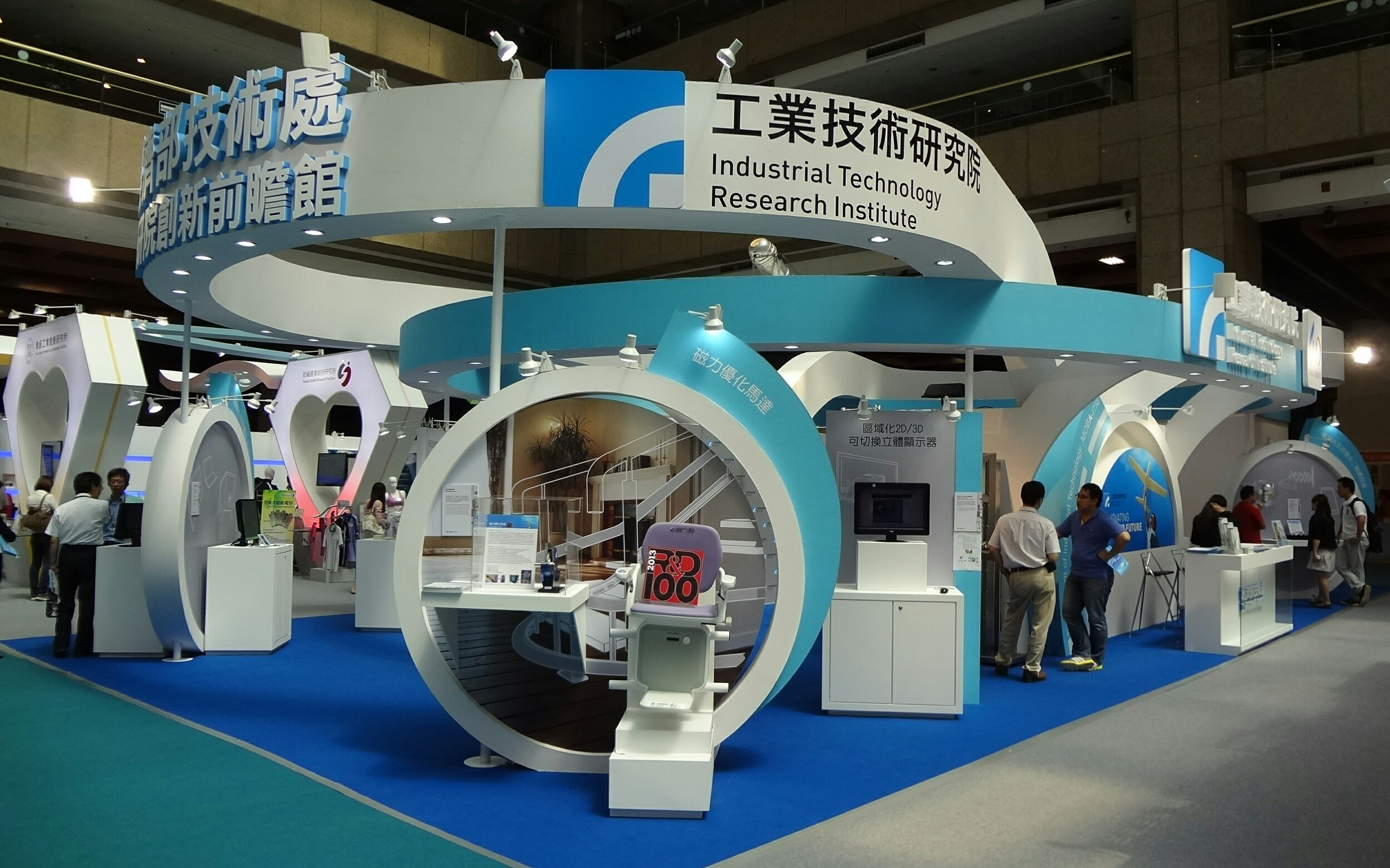 2013台北國際發明暨技術交易展的工研院創新前瞻館